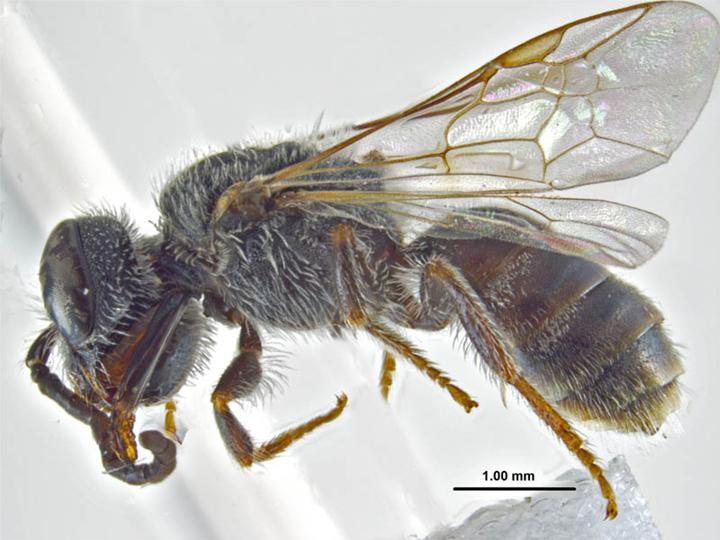 Lasioglossum clelandi male